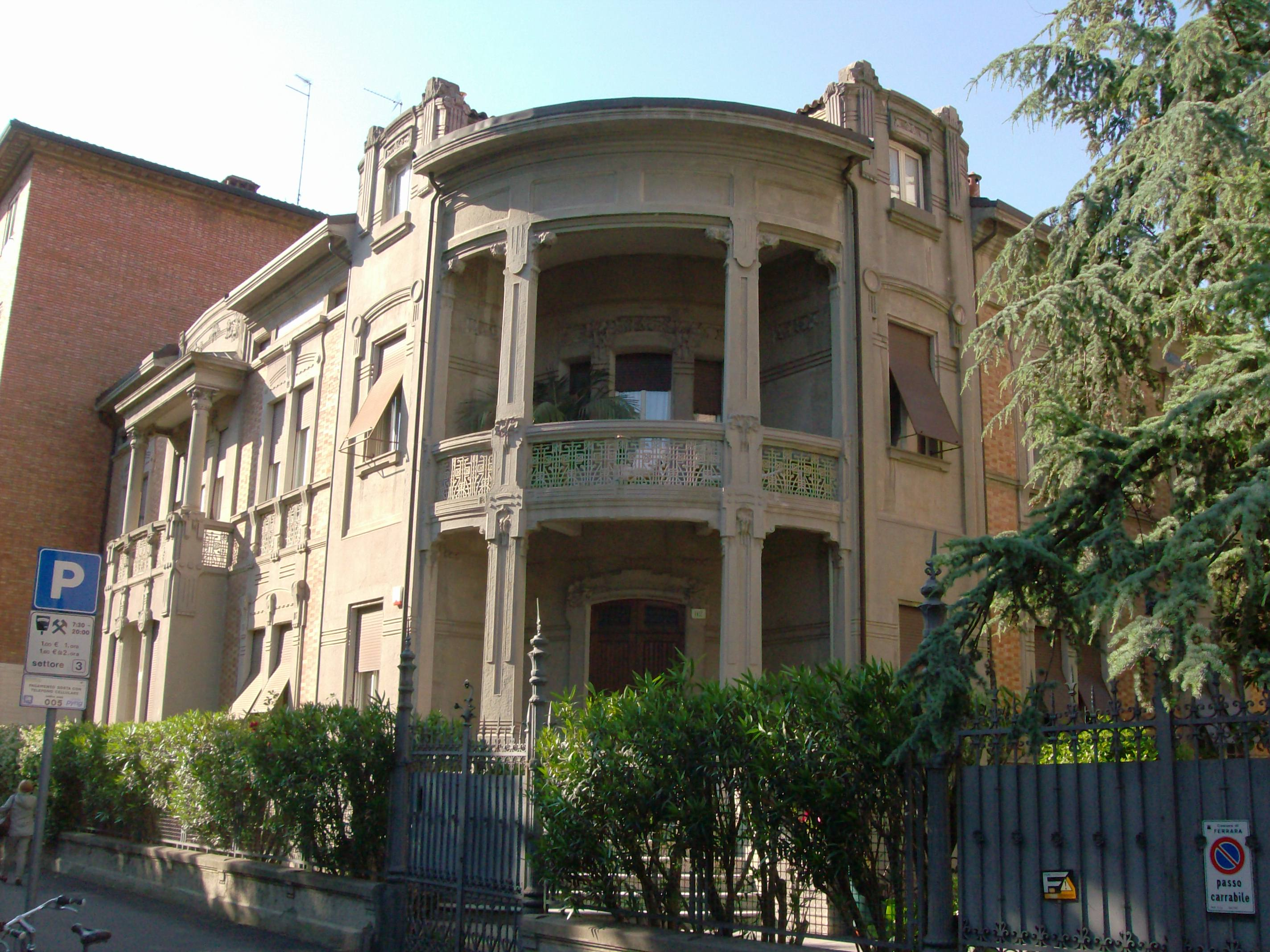 Villino Masieri - Finotti in viale Cavour 112 Ferrara